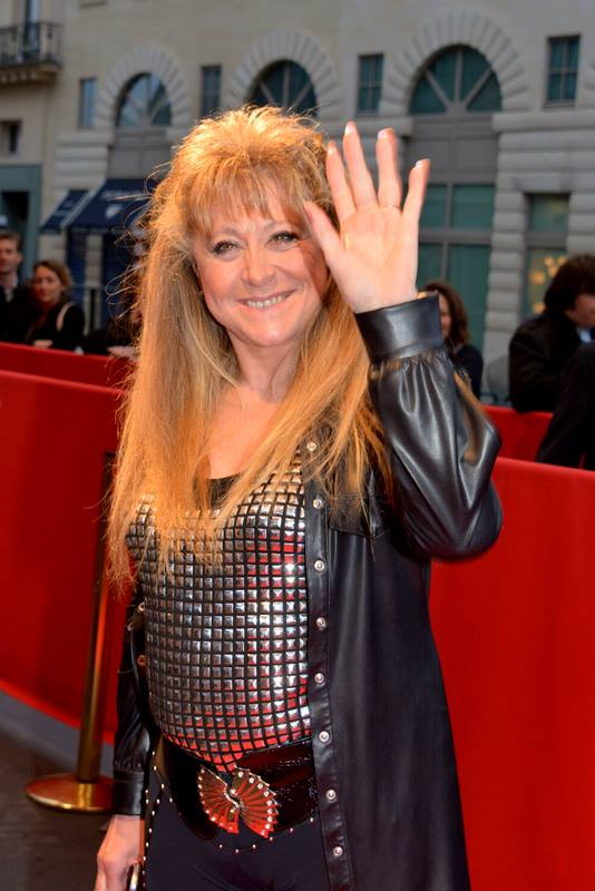 Chantal Richard (Sloane de "Peter et Sloane" à l'avant-première du film "Nos femmes"